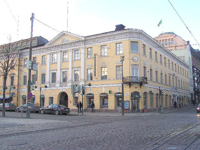 Pohjoisesplanadi 19. Arkkitehti Pehr Granstedt 1816.